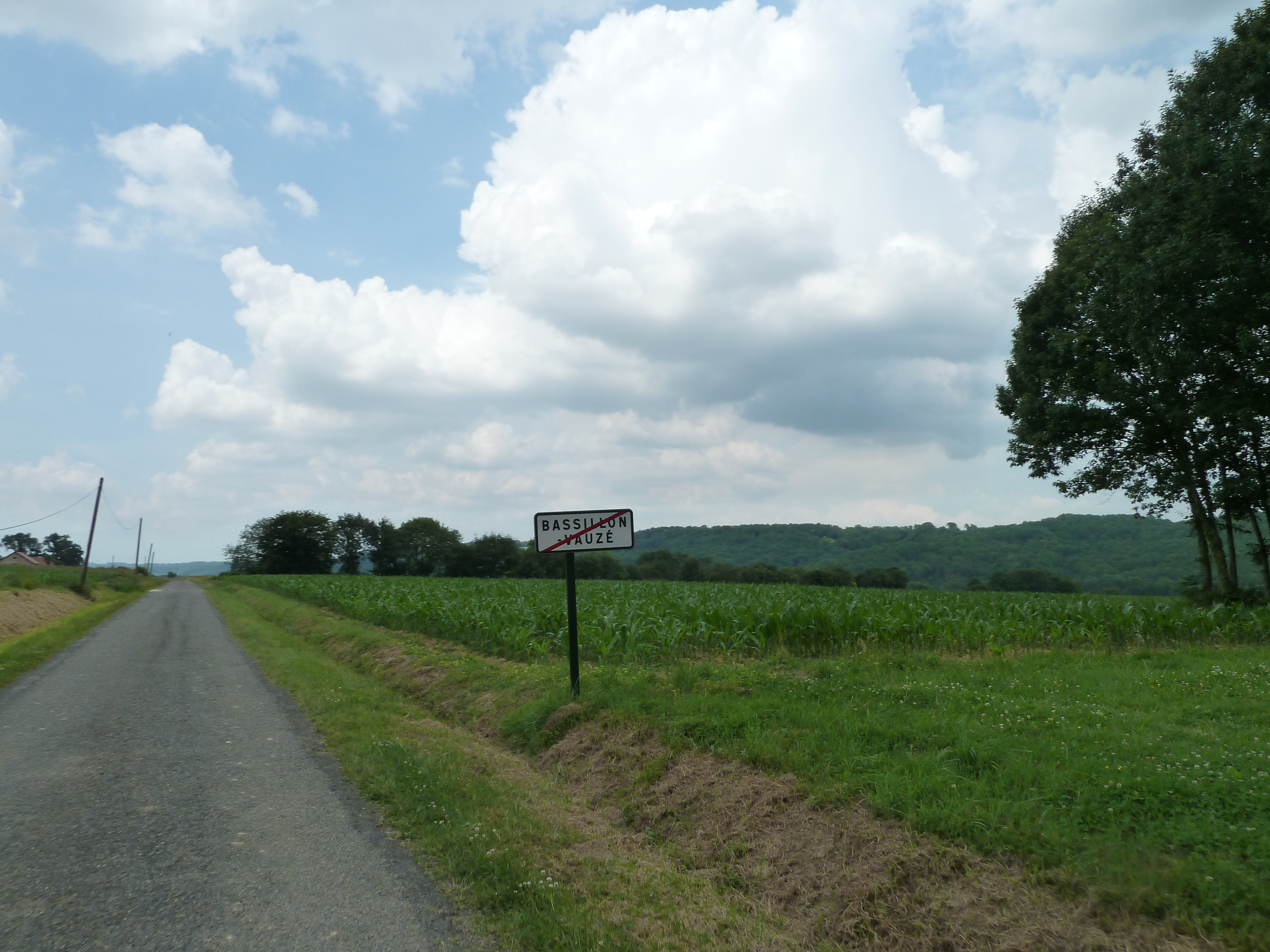 Sortie de Bassillon-Vauzé